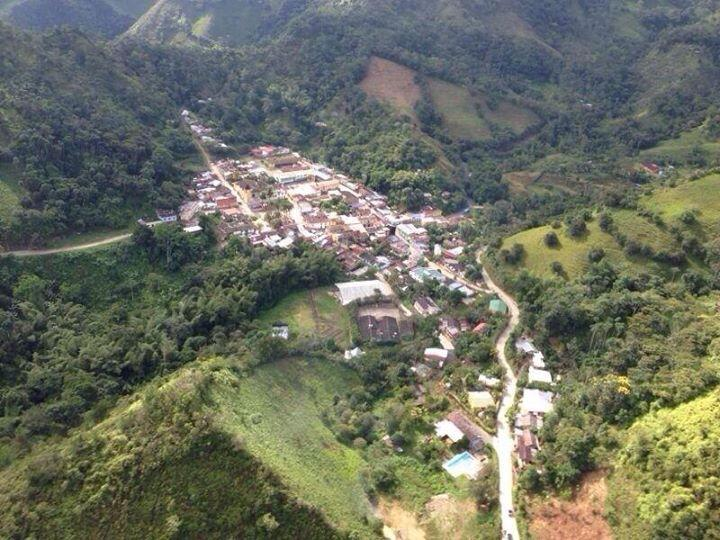 Paime Desde Las Alturas